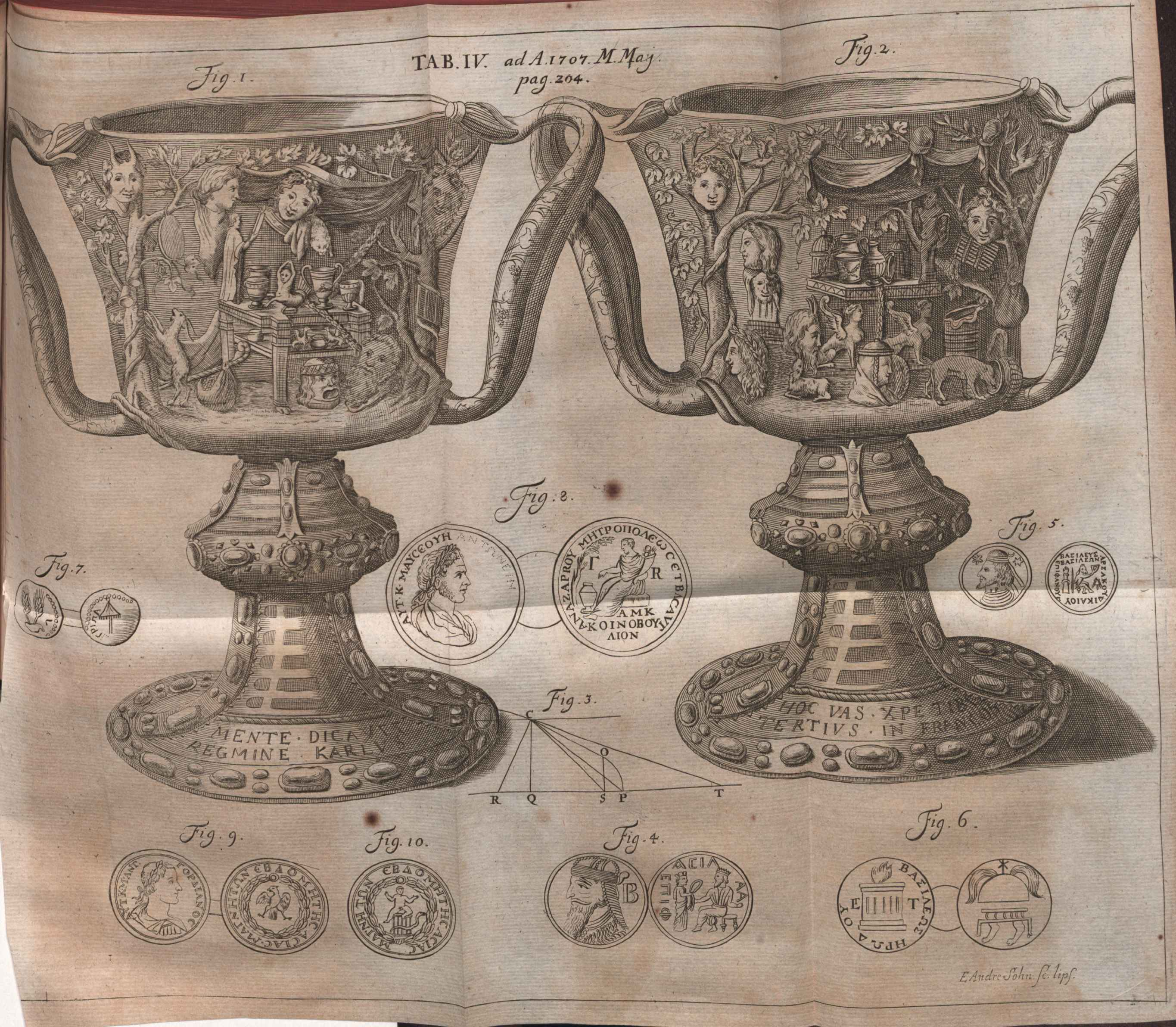 Illustration